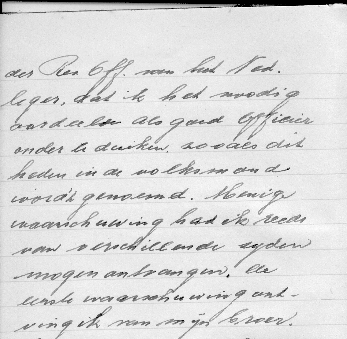 Bladzijde 2 uit het dagboekje van P.C. Kroon dat hij bijhield tijdens zijn onderduikingsperiode.